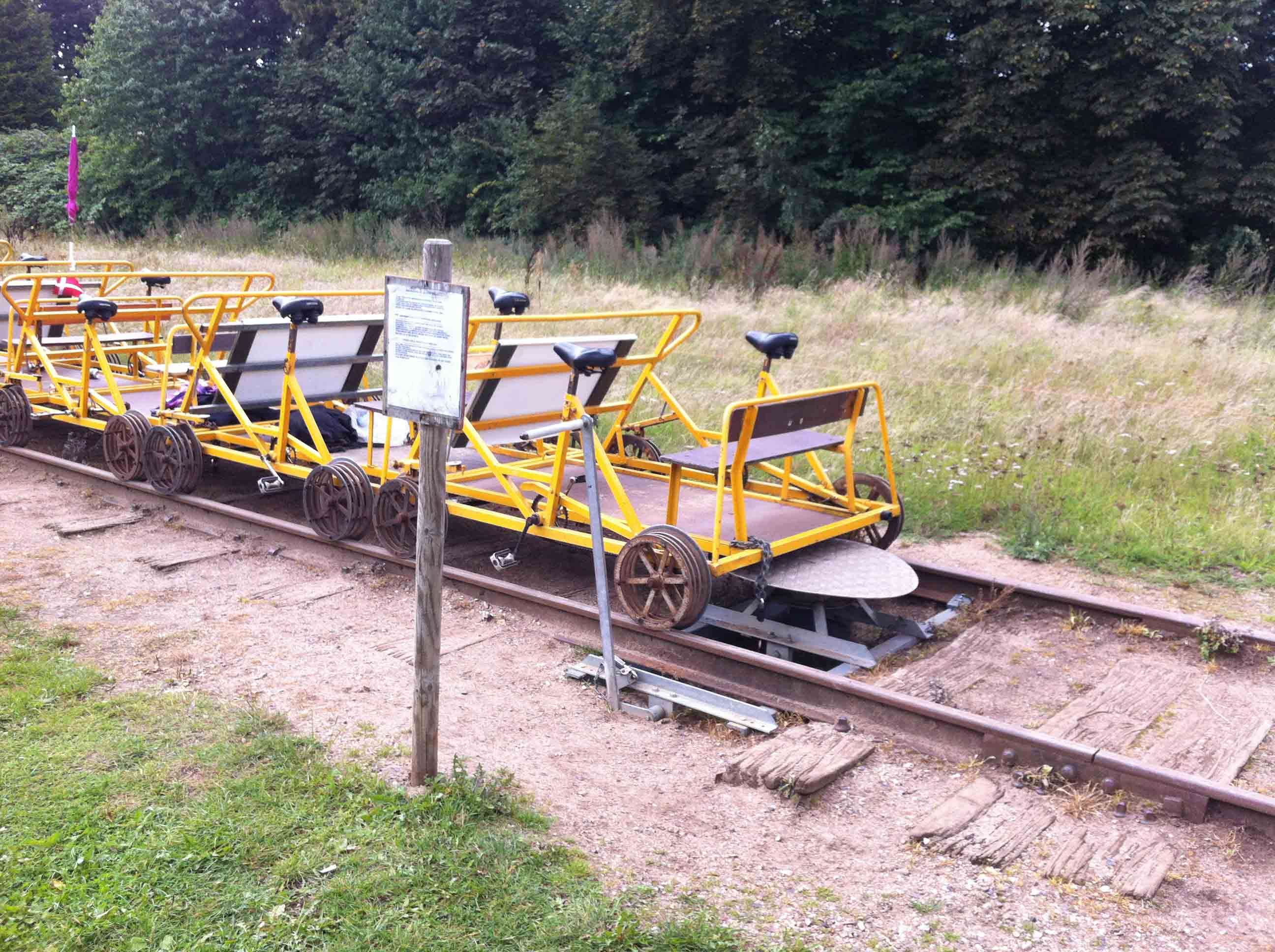 Drejeskive til skinnecykler på Assensbanen ved Nårup Station